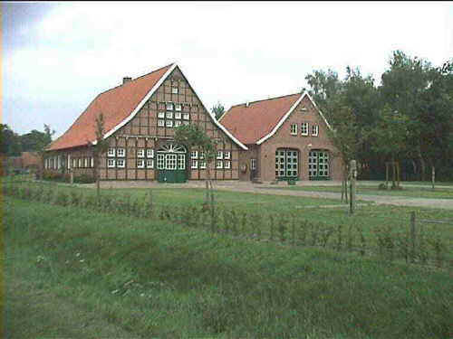 Das Gemeindehaus der Gemeinde Wettrup. Im linken Teil sind 2 Ferienwohnungen (5 + 15 Personen) und im Erdgeschoss ein Raum für Tagungen und Feiern untergebracht. Im rechten teil ist die örtliche Feuerwehr beheimatet.